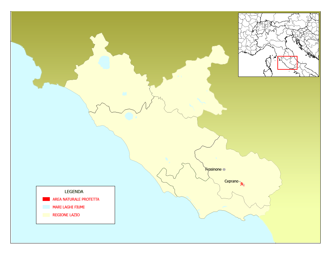 Mappa Riserva naturale Antiche Città di Fregellae e Fabrateria Nova e del Lago di San Giovanni Incarico, Lazio, Italia